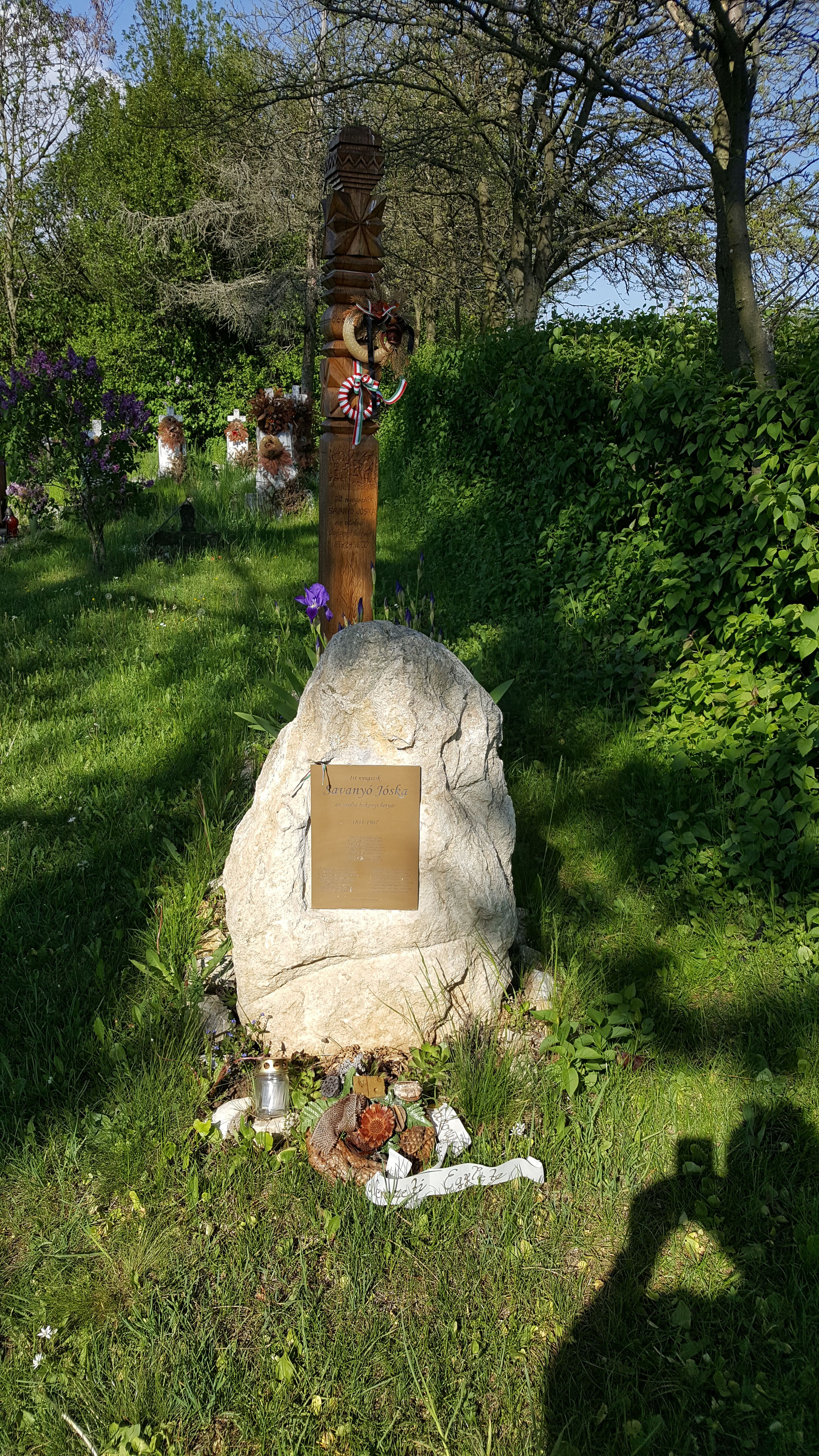 Savanyú Jóska síremléke 2017.05.06-án.